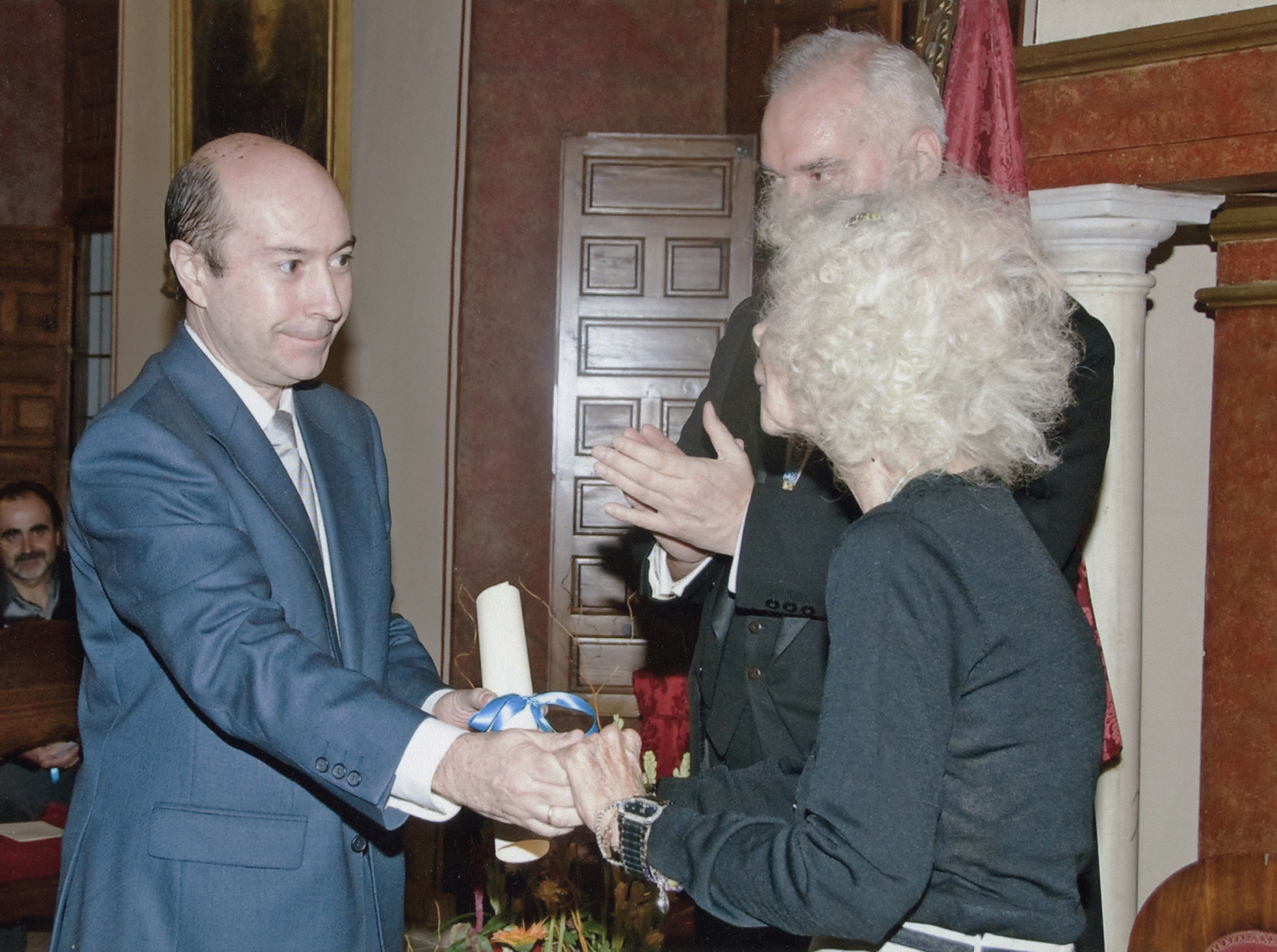 Luis Javier Gayá en la entrega del premio de pintura "Duquesa de Alba" en la Real Academia de Bellas Artes de Sevilla.